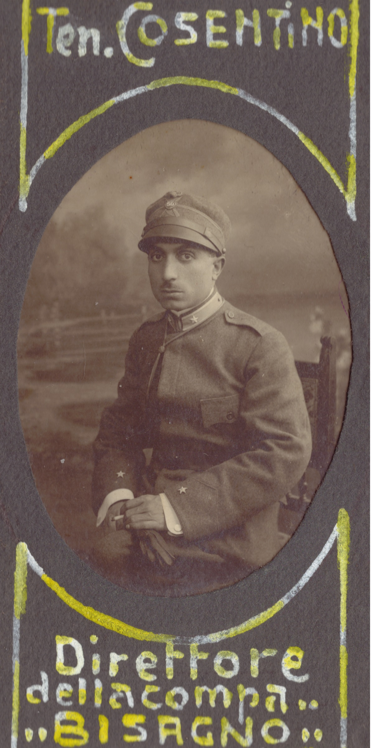 Regista-commediografo-sceneggiatore